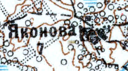 Топографическая карта Ленинградской области, квадрат VIc-28 (Луга), деревня Яковно